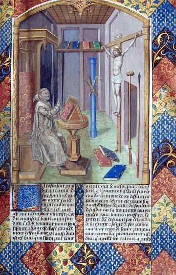 Ludolf von Sachsen, Abbildung in Vita Christi, 1474.